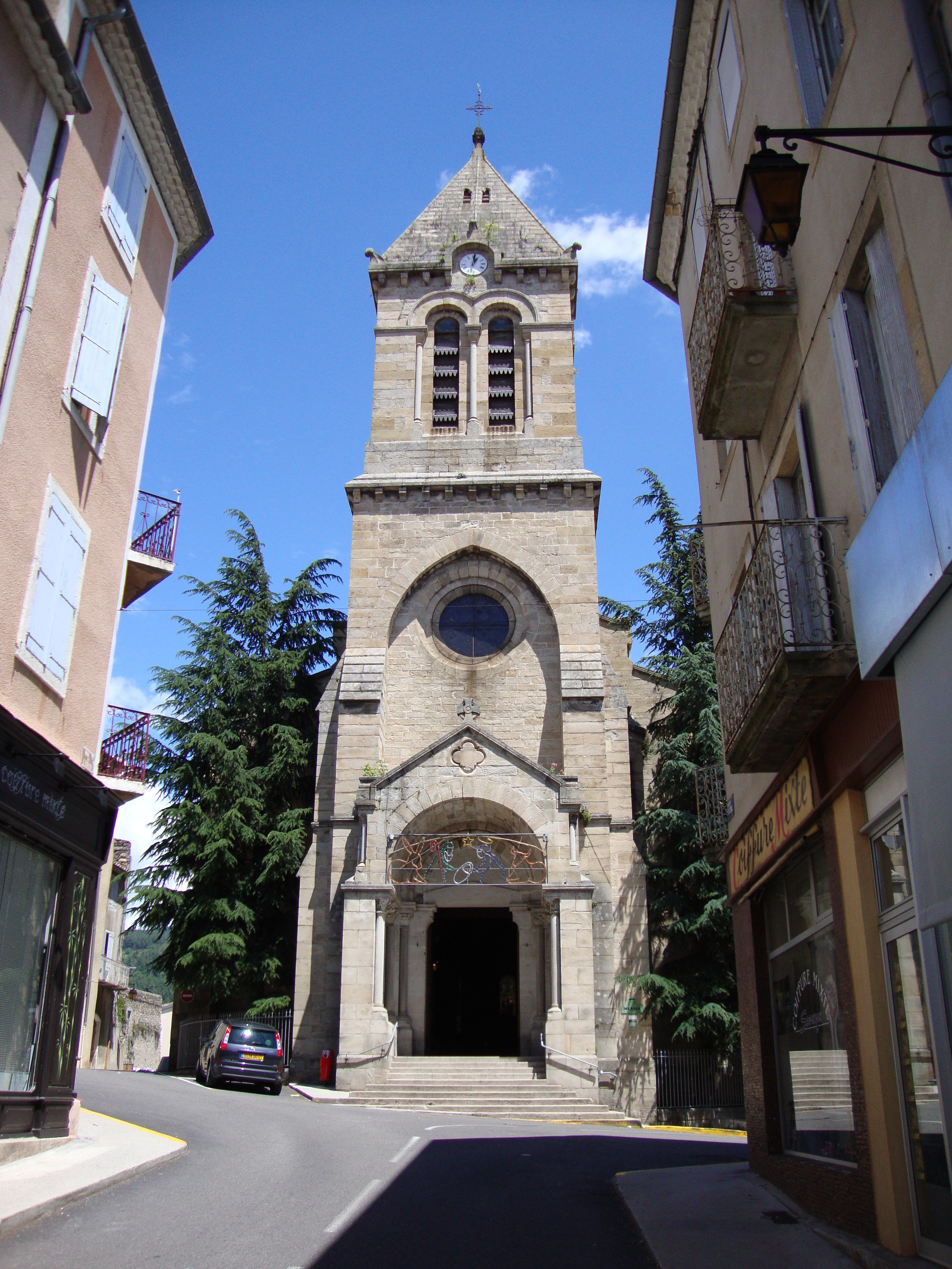 Privas (Ardèche, Fr) une des églises